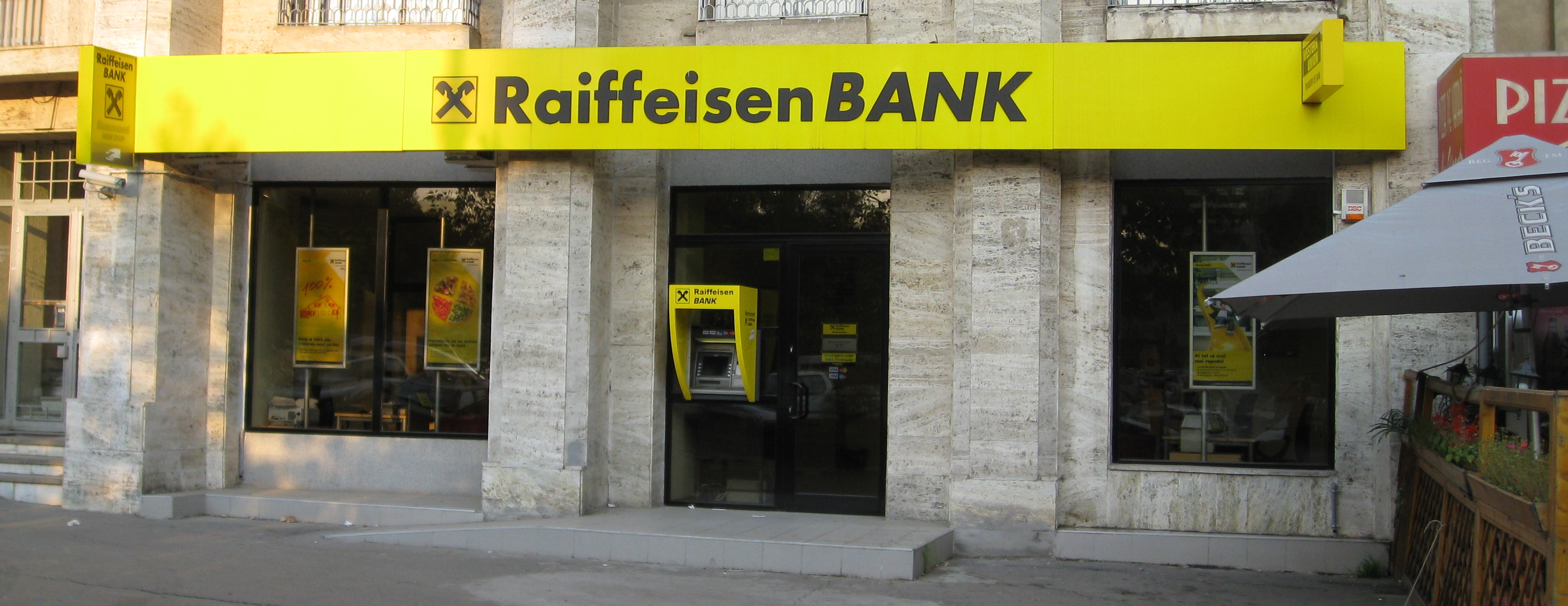 Raiffeisen Bank branch, Bucharest, Romania